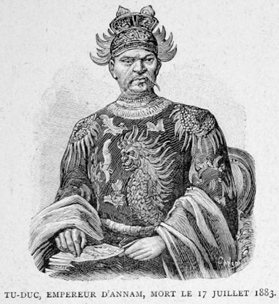 Ký họa chân dung hoàng đế Nguyễn Dực Tôn năm 1883.